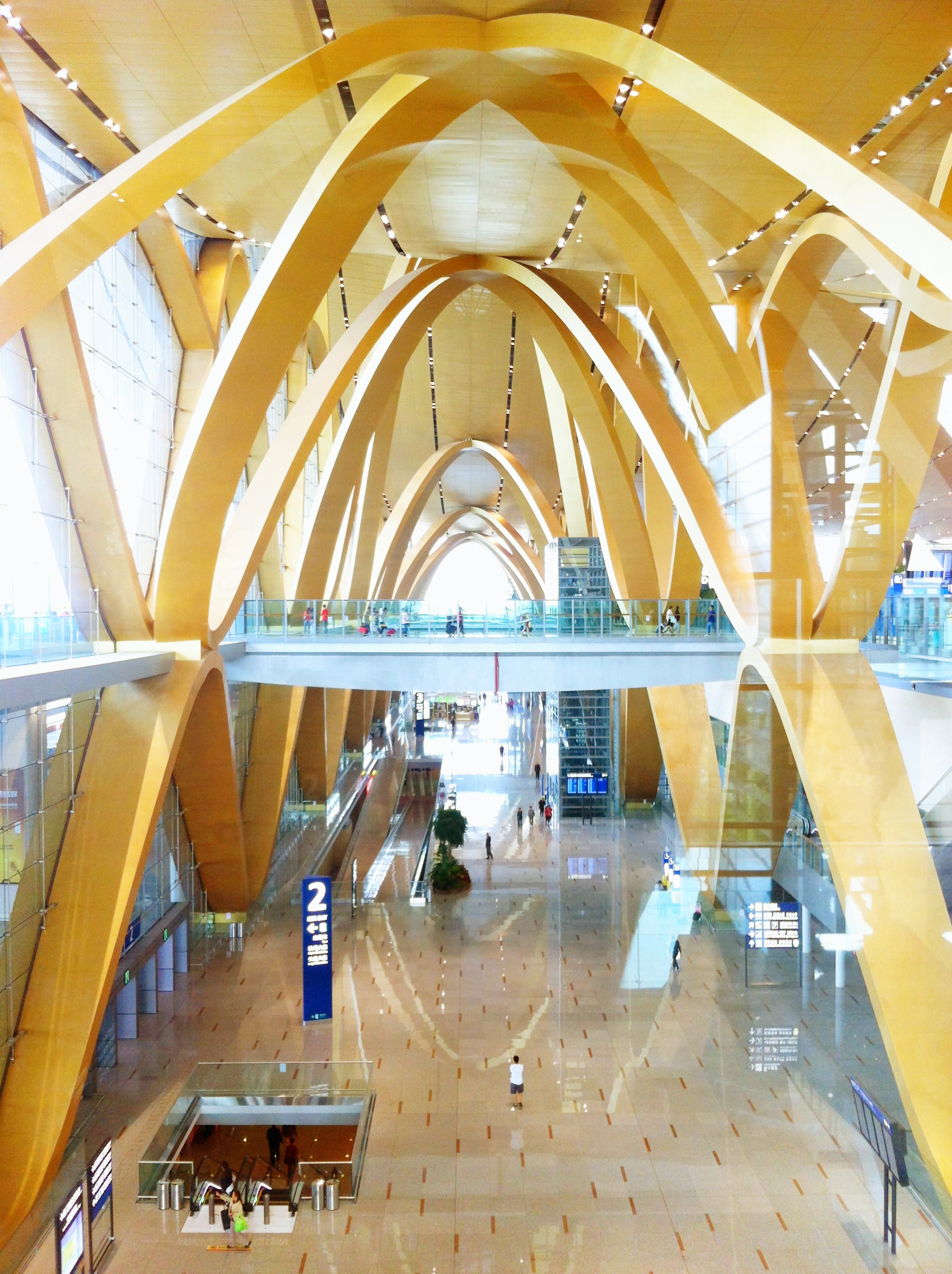 昆明长水国际机场航站楼内部